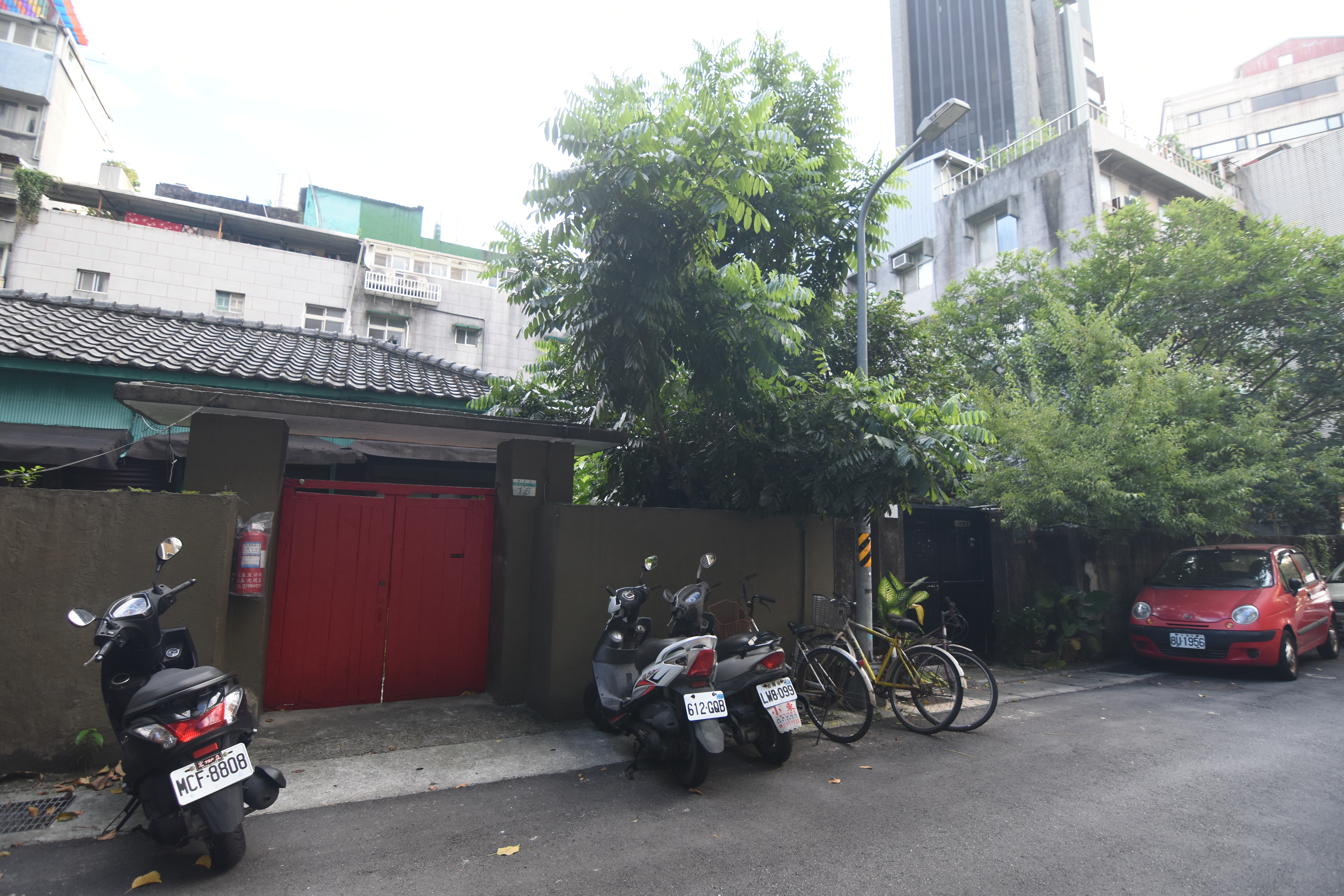 臺大宿舍－大安區瑞安街264巷16、18號